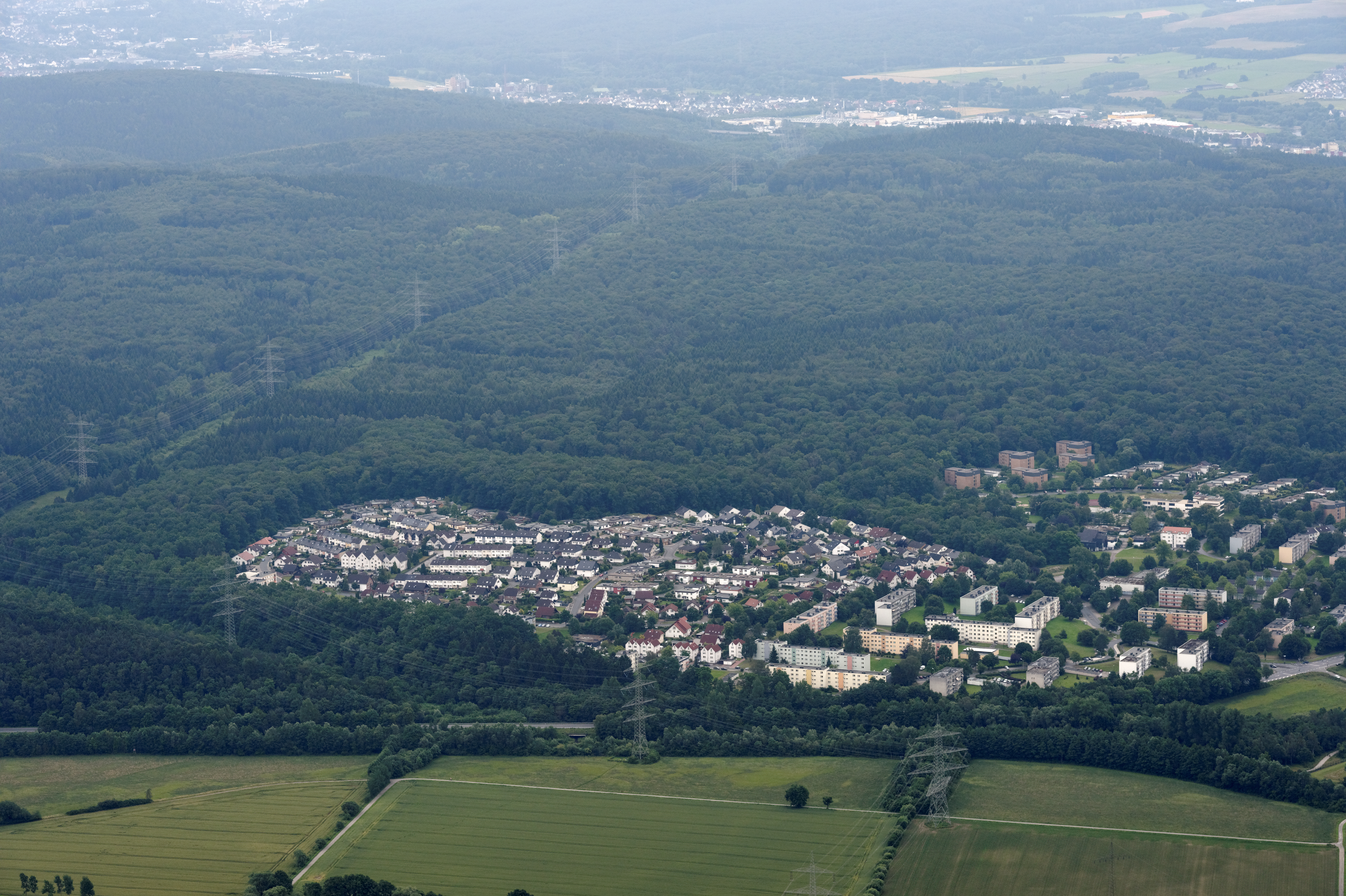 Fotoflug Sauerland Nord. Arnsberg-Neheim, Moosfelde The making of this document was supported by the Community-Budget of Wikimedia Germany.